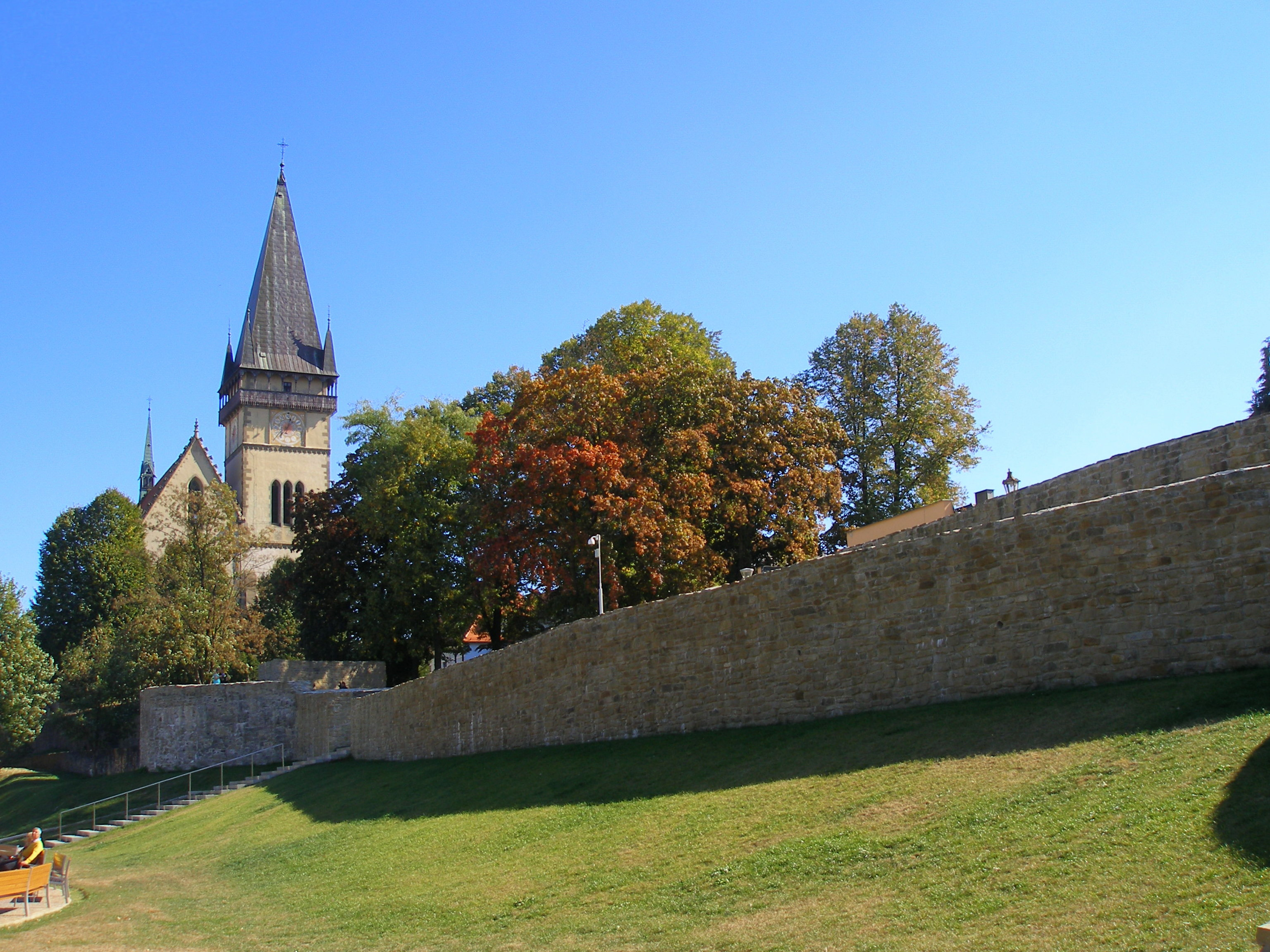 Mesto Bardejov.